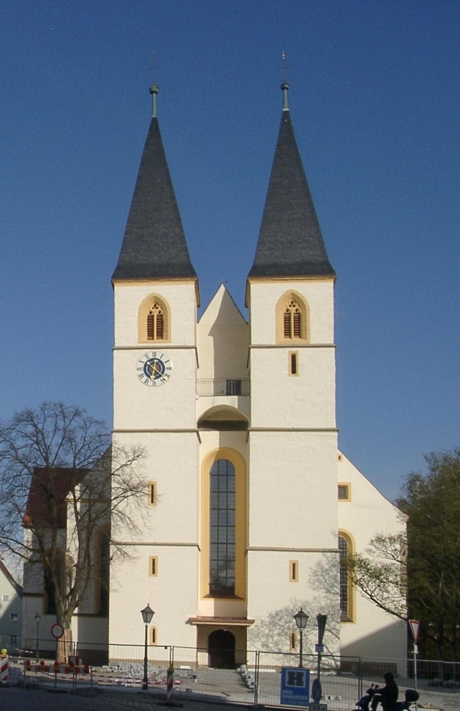 Herrieden